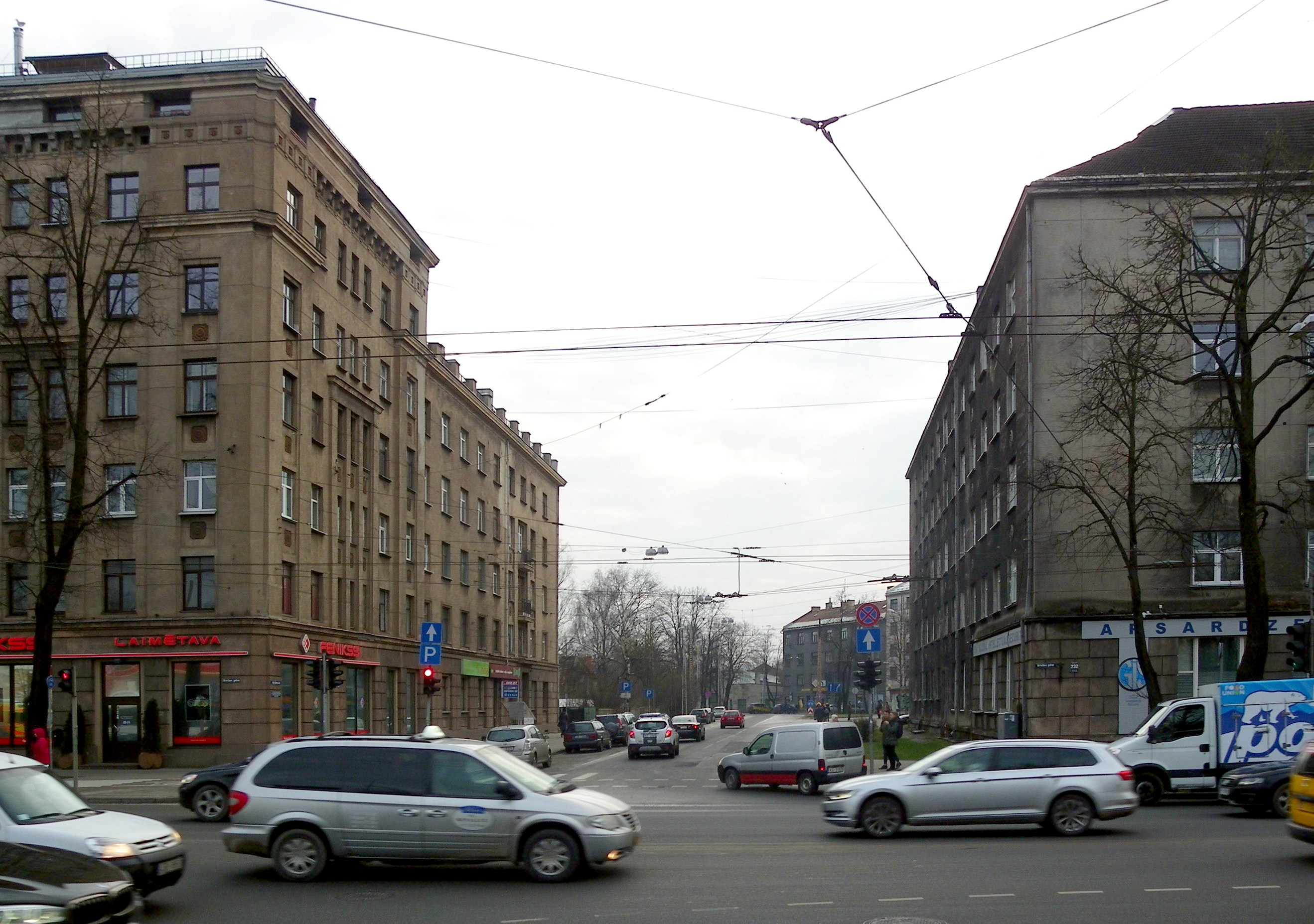 Viļa Ģelbes iela, skats no Brīvības gatves